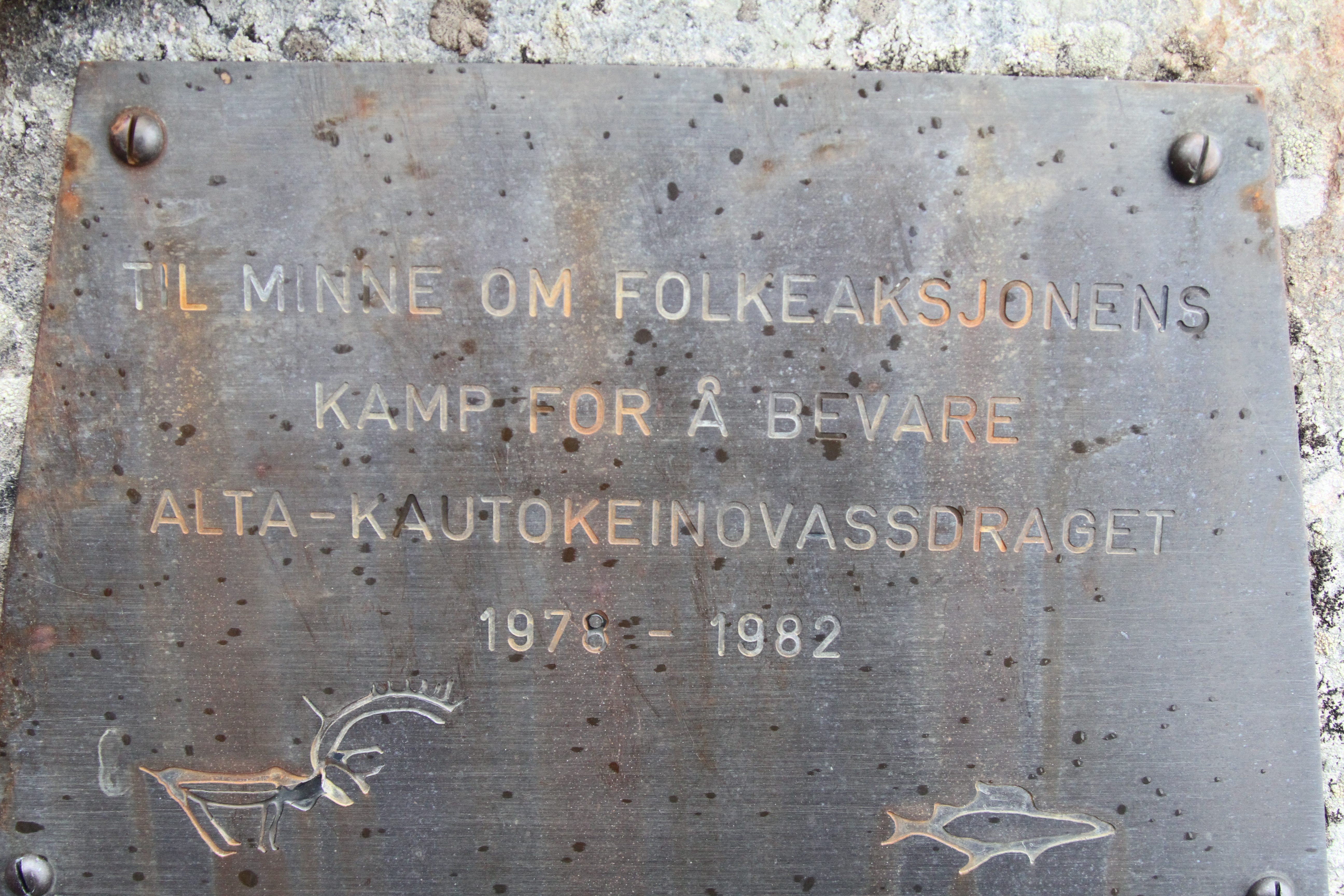 Inskriptionen på minnesmärket i Gargia för de som kämpade mot utbyggnaden av Altaälven.